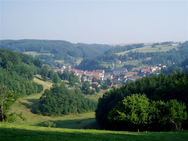 walschbronn